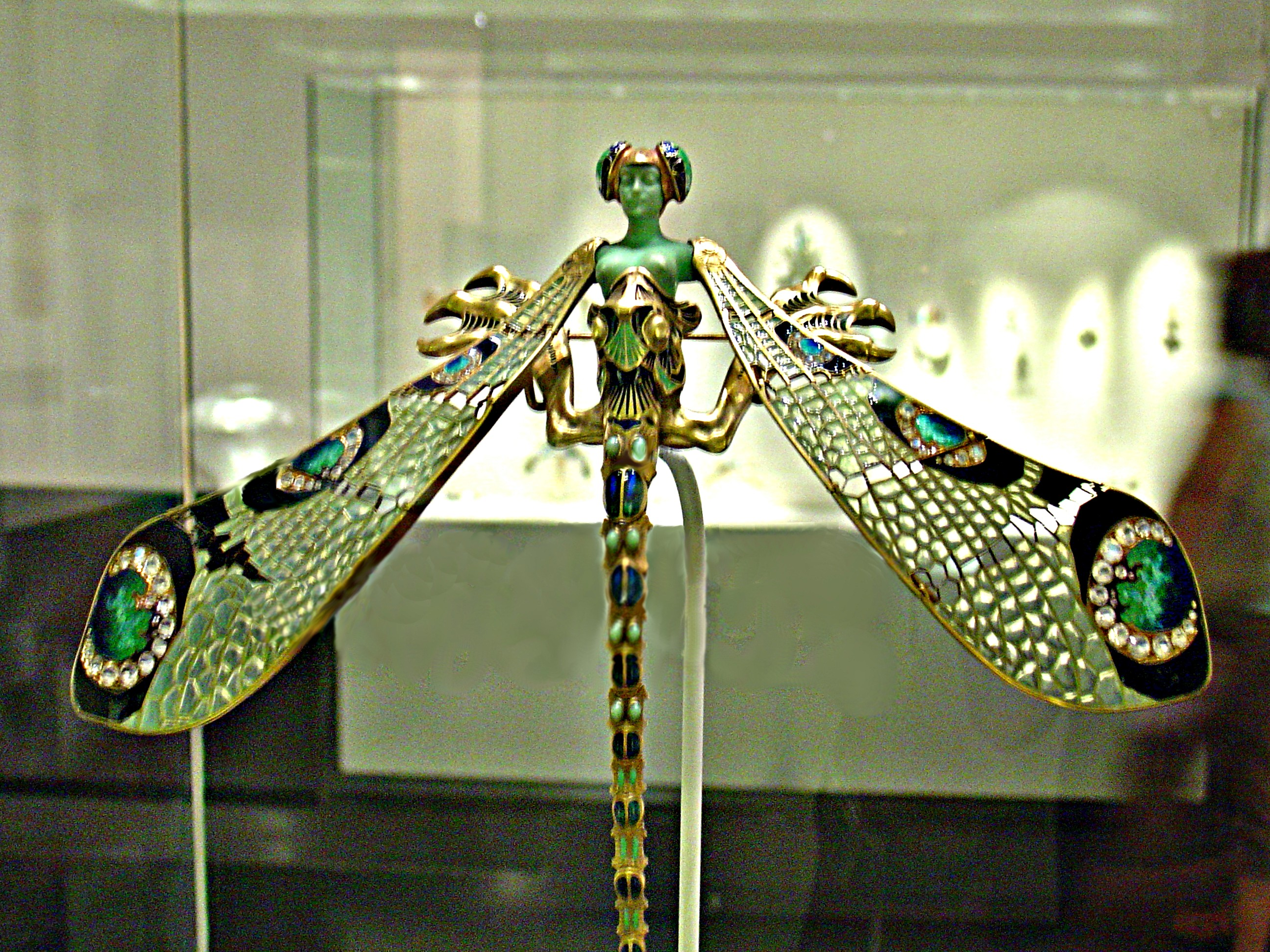 Libellule René Lalique. Musée Calouste Gulbenkian, Lisbonne